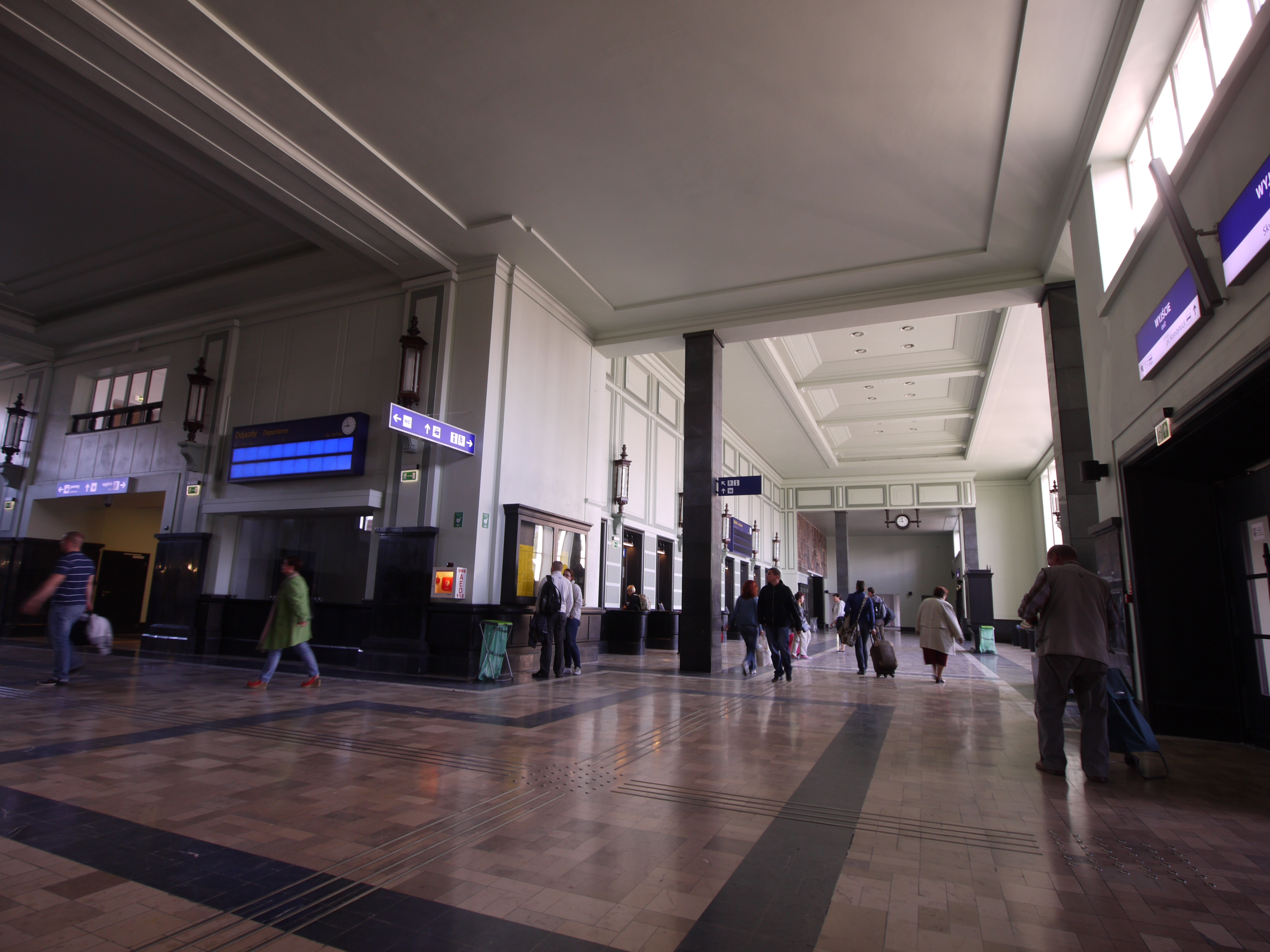 Dworzec Gdynia Główna: budynek dworca głównego - wnętrze. Widok w stronę kas. Wnętrze po remoncie przeprowadzonym w latach 2010-2012. Plac Konstytucji 1, Gdynia